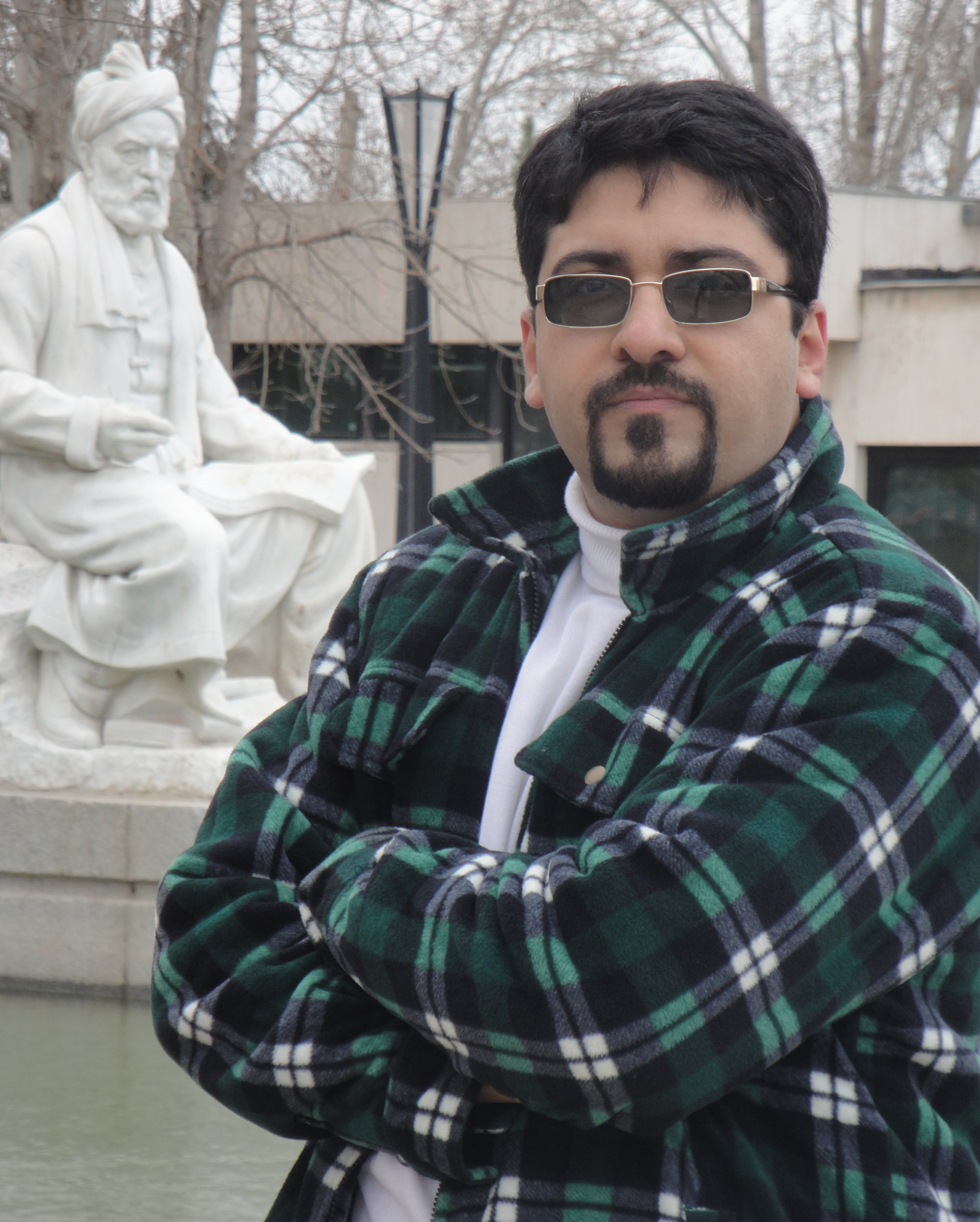 آرمان آرین در کنار مقبره حکیم توس